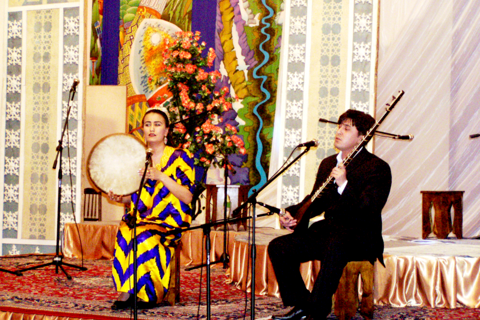 Народная музыка в исполнении Насибы Омонбоевой и Камолиддина ХамдамоваТоҷикӣ: Навои халқӣ дар иҷрои Насиба Омонбоева ва Камолиддин Хамдамов дар ш. Хуҷанд